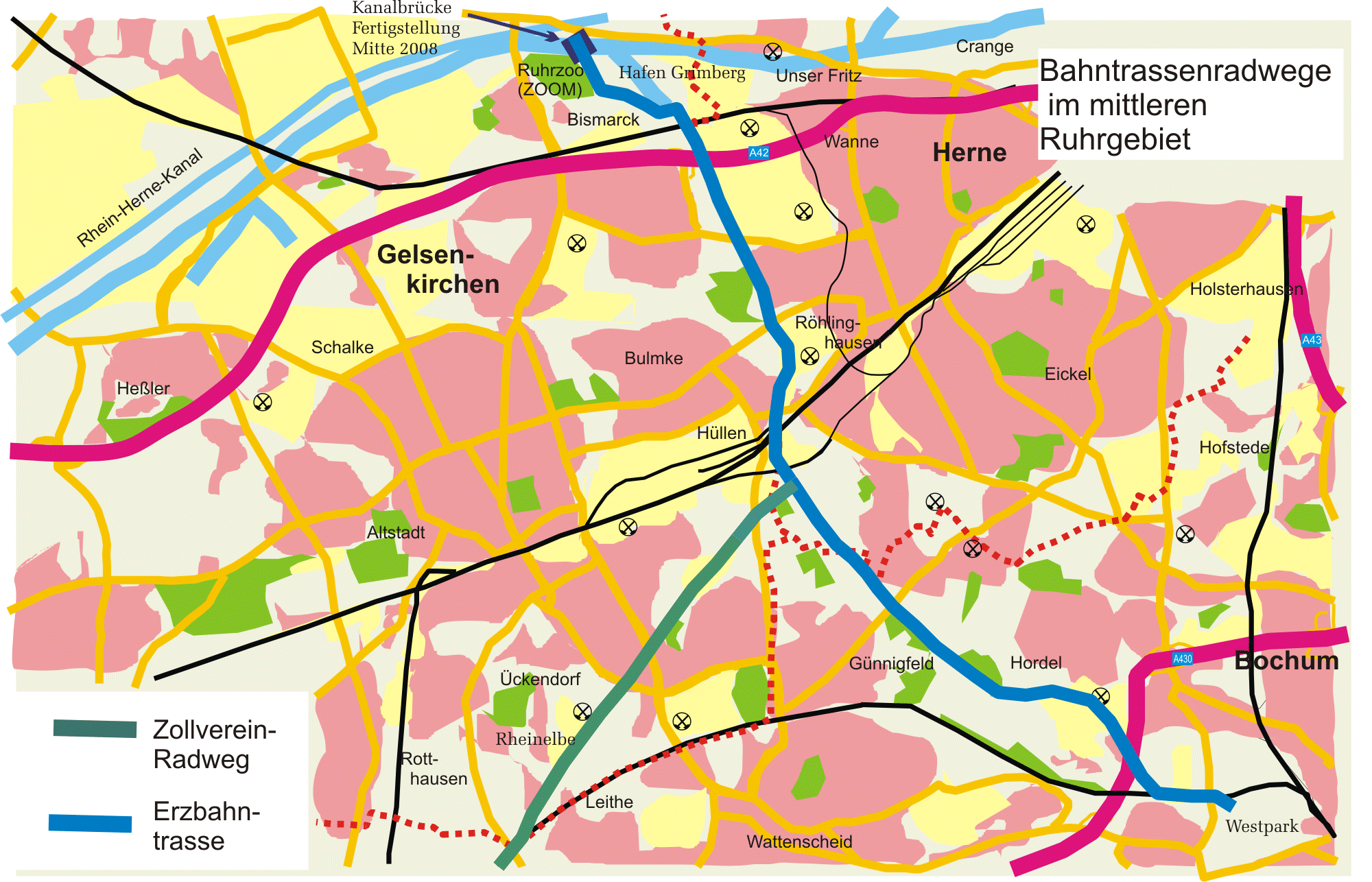 Stillgelegte Bahntrassen im mittleren Ruhrgebiet, die als Fahrradwege umgebaut worden sind